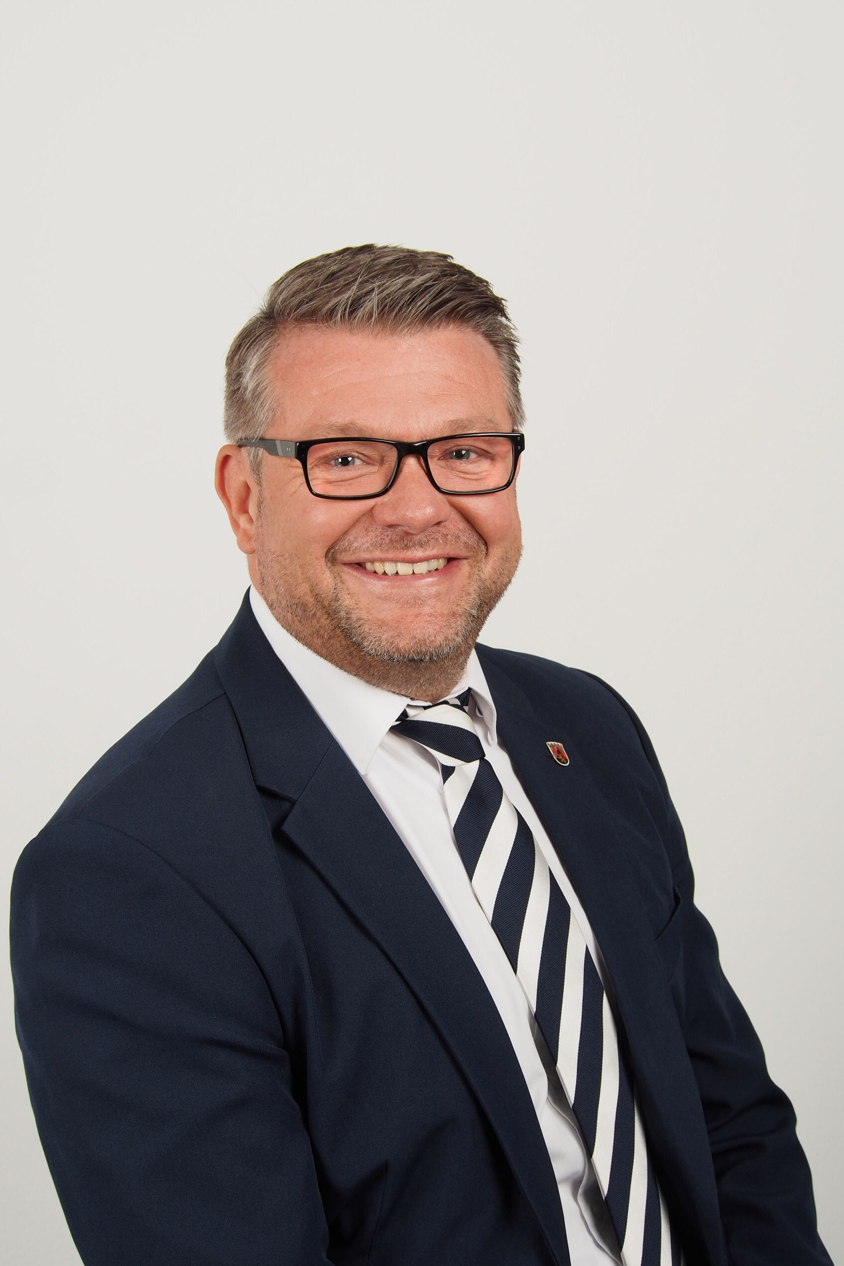 Landtagsabgeordneter Rheinland-Pfalz